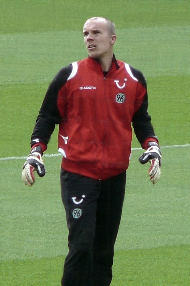 Robert Enke Robert Enke vor dem Heimspiel von Hannover 96 (Überarbeitete Version)